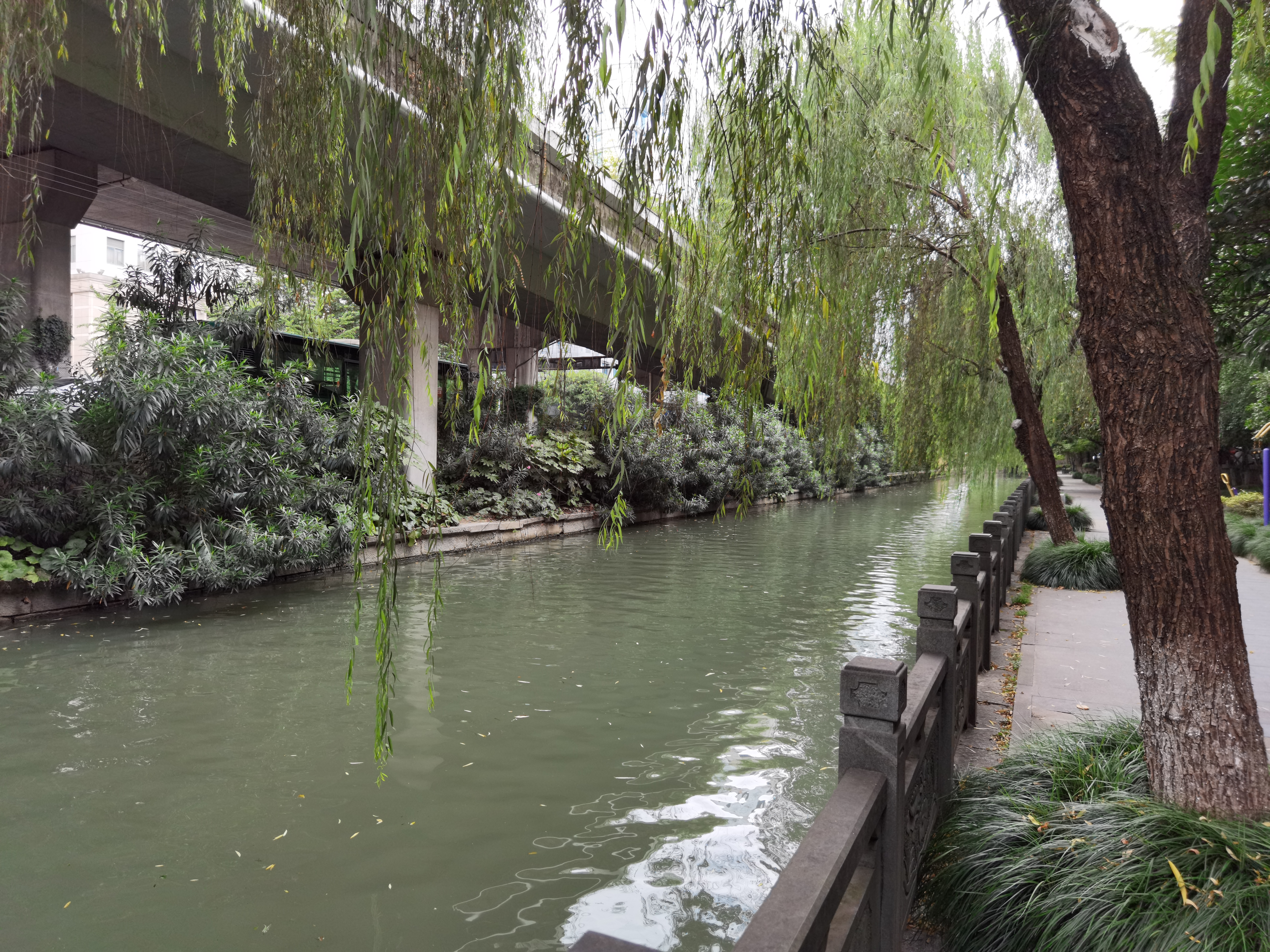 杭州中河岸边